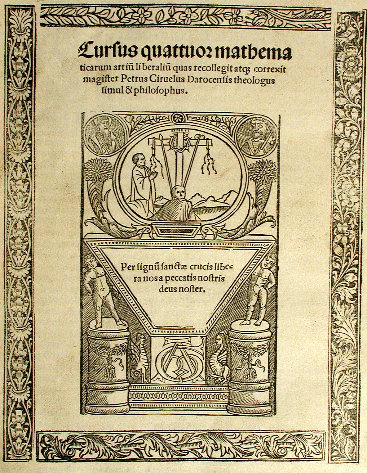 Pedro Ciruelo, Cursus quatuor mathematicarum artium liberalium..., Alcalá, A. G. de Brocar, 1516. (Frontispicio)